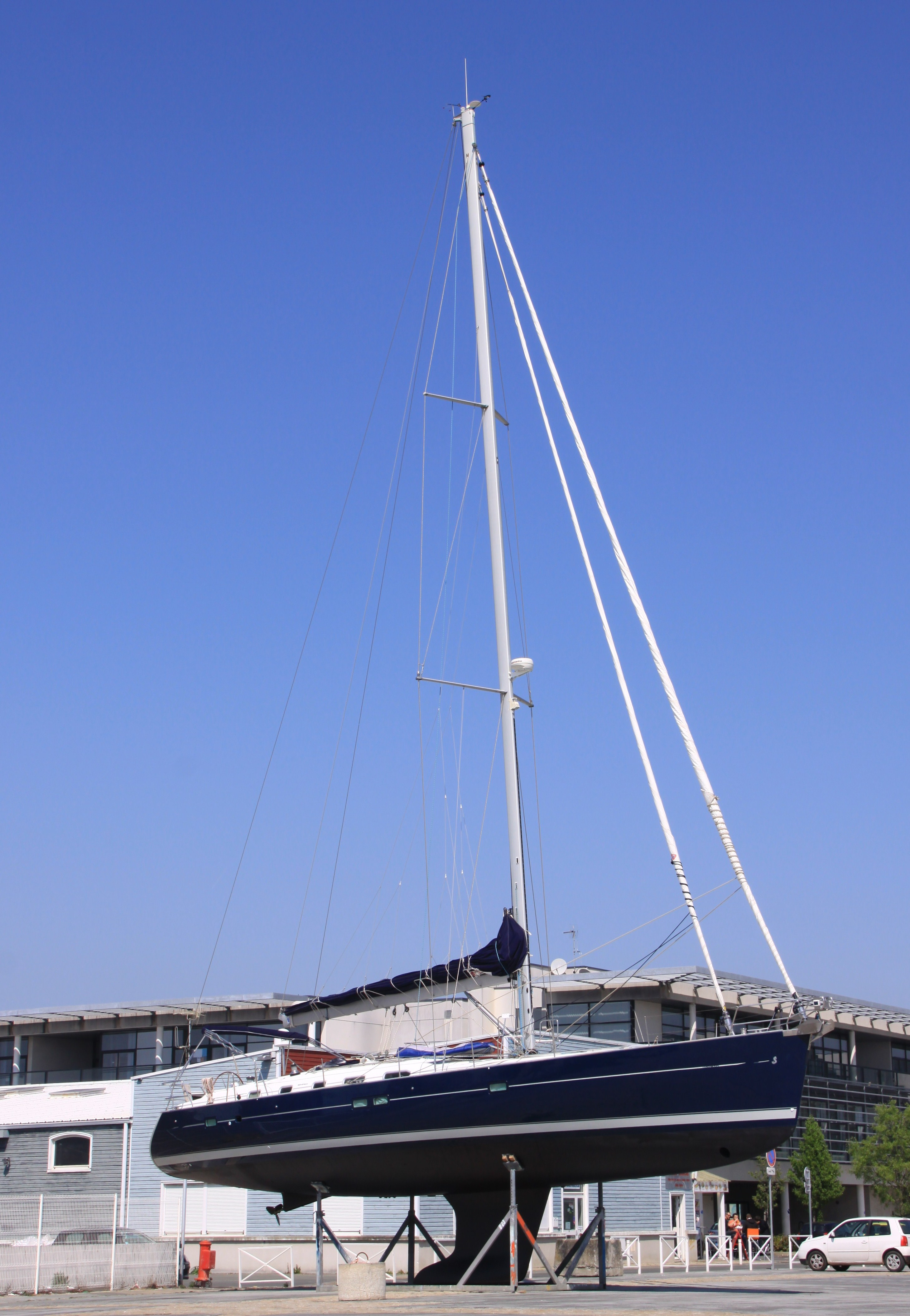 Vue totale d' un voilier Bénéteau Oceanis Clipper 423 avec son gréement placé dans un ber sur le plateau nautique de la Ville en Bois à La Rochelle. L' Oceanis 423 est un bateau de serie. Cette serie a été lancée en 2002. Ce voilier mesure 13,09 mètres de long hors tout, 3,90 mètres de large et 2,10 mètres de tirant d' eau standard. Il a une surface de voile de 94 m2 et un moteur de 60 CV. L 'architecte de l' Oceanis Clipper 423 est le Groupe Finot. La Rochelle, Charente Maritime, France.